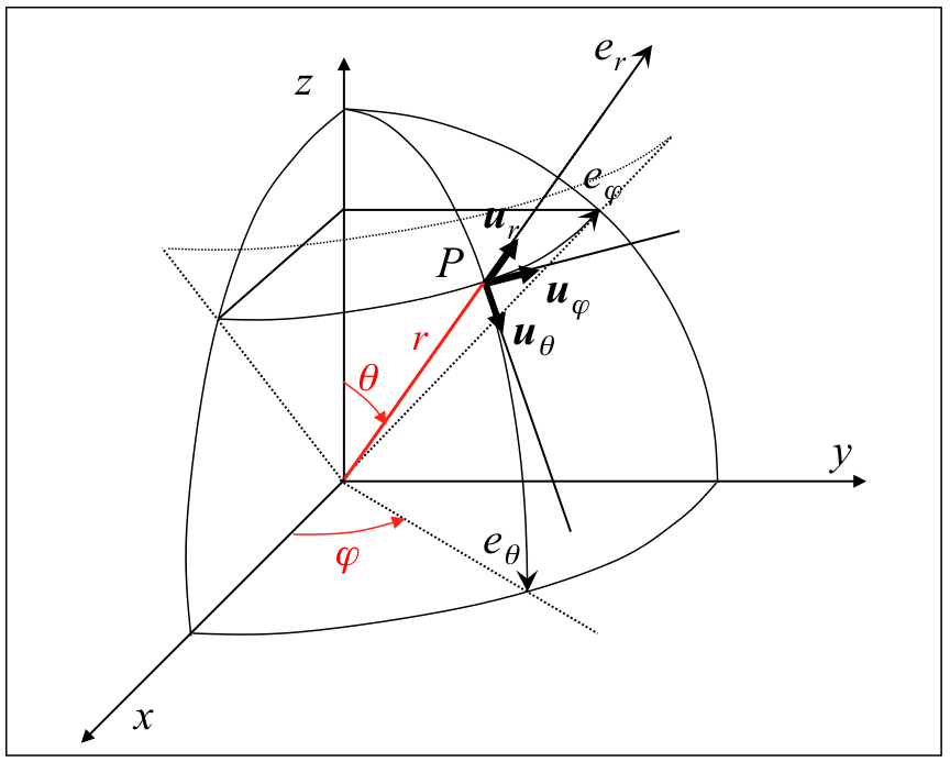 Koordenatu esferikoen definiziorako grafikoa.